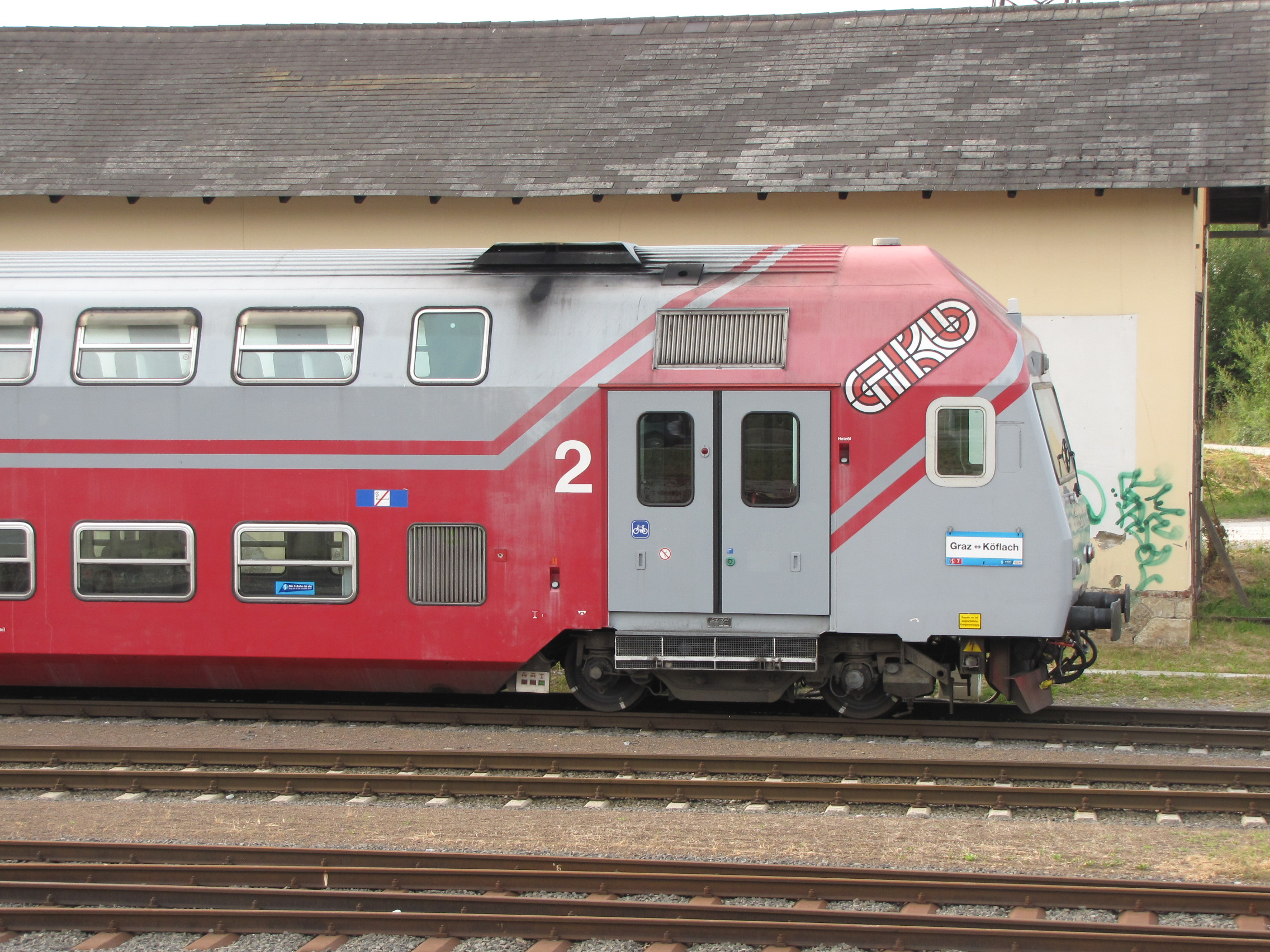 A GKB egy emeletes vezérlő kocsija (Bmfpv-d) Köflach állomáson.